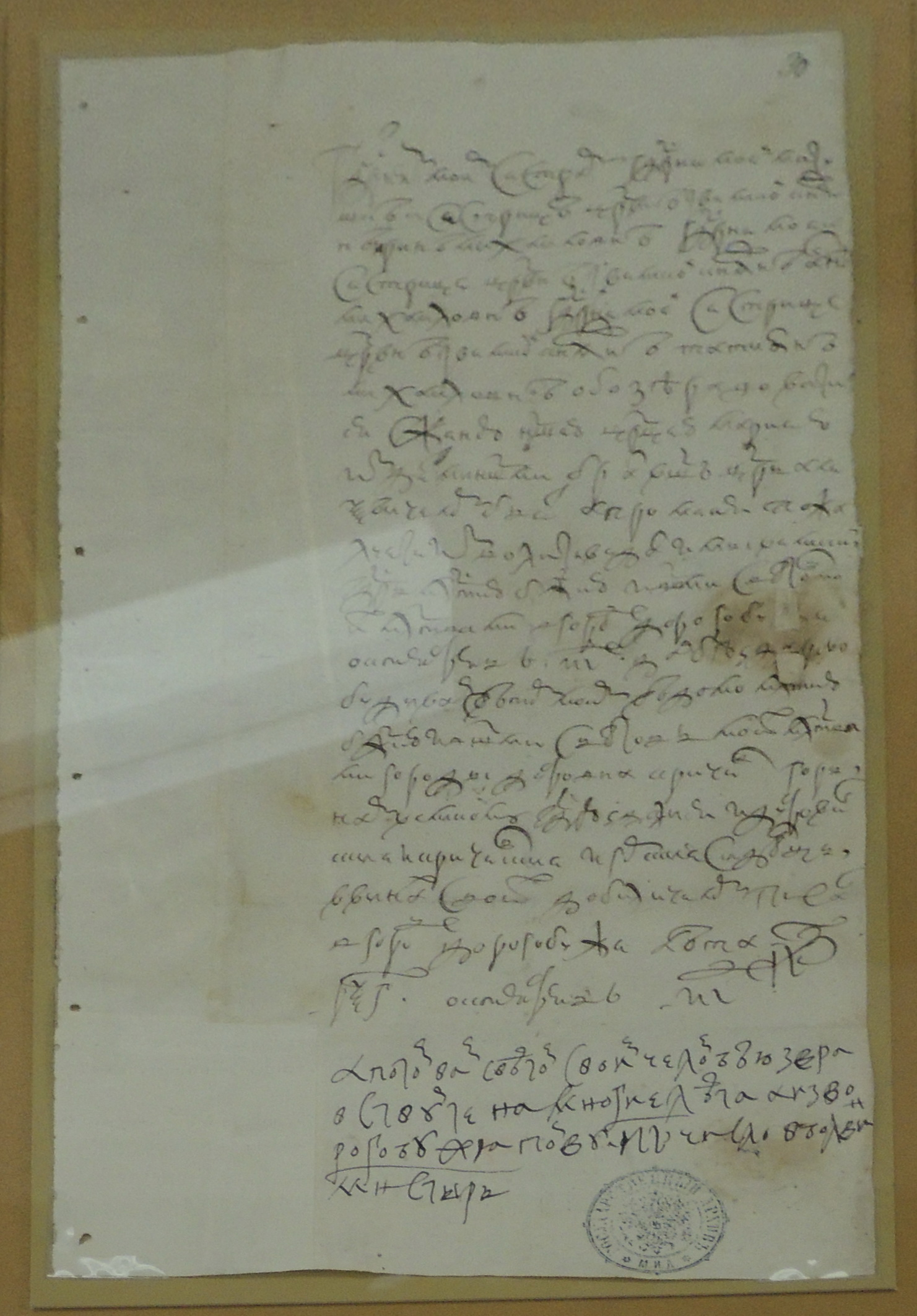 Письмо царя Алексея Михайловича семье из Дорогобужа. 18 октября 1654 года. Четыре нижних строчки - автограф царя. РГАДА. Письмо сестрам Ирине, Анне и Татьяне написано из похода Выставка "Романовы. Начало династии", Государственный Исторический музей, весна 2013 года